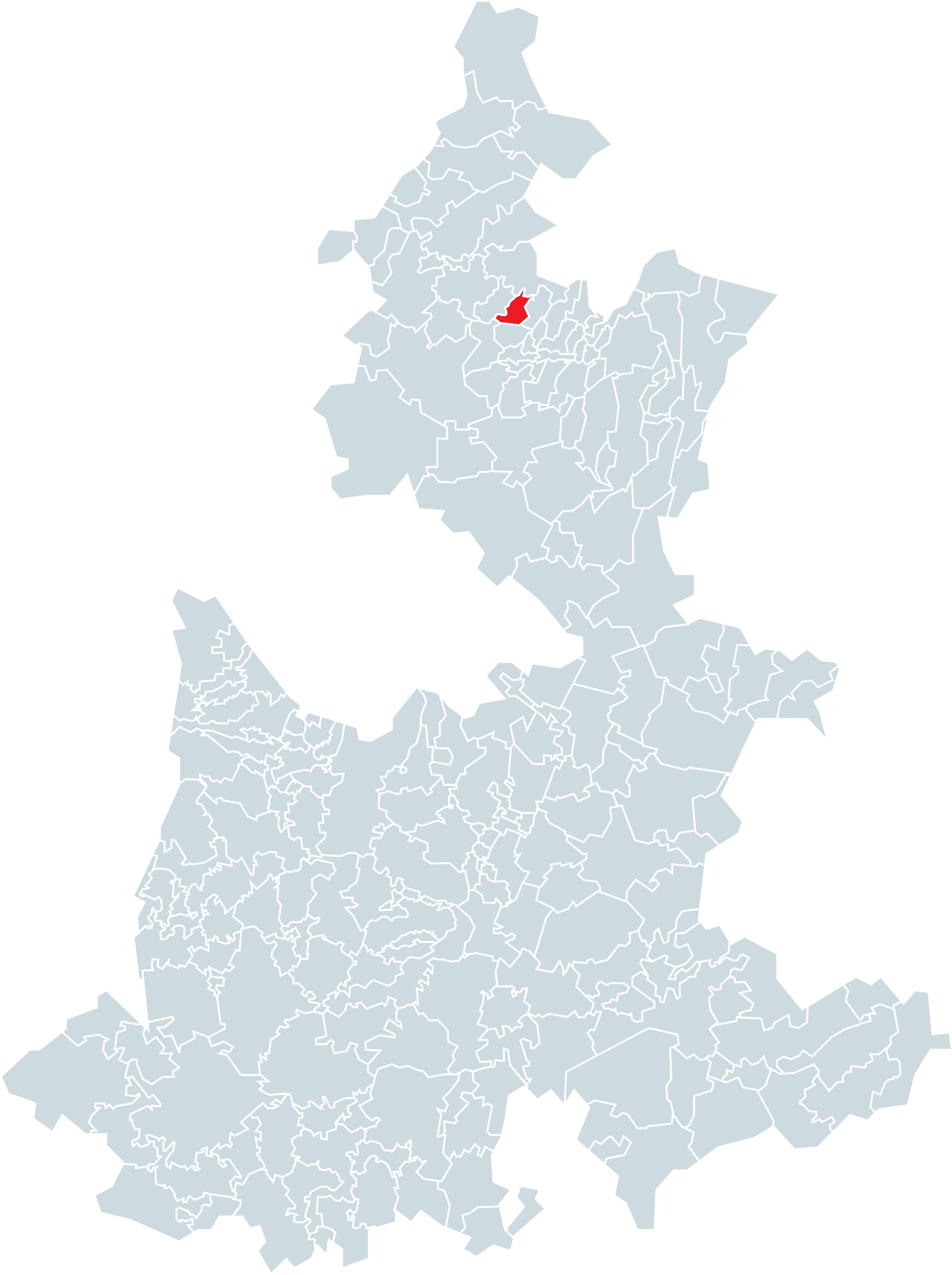 Municipio de San Felipe Tepatlán